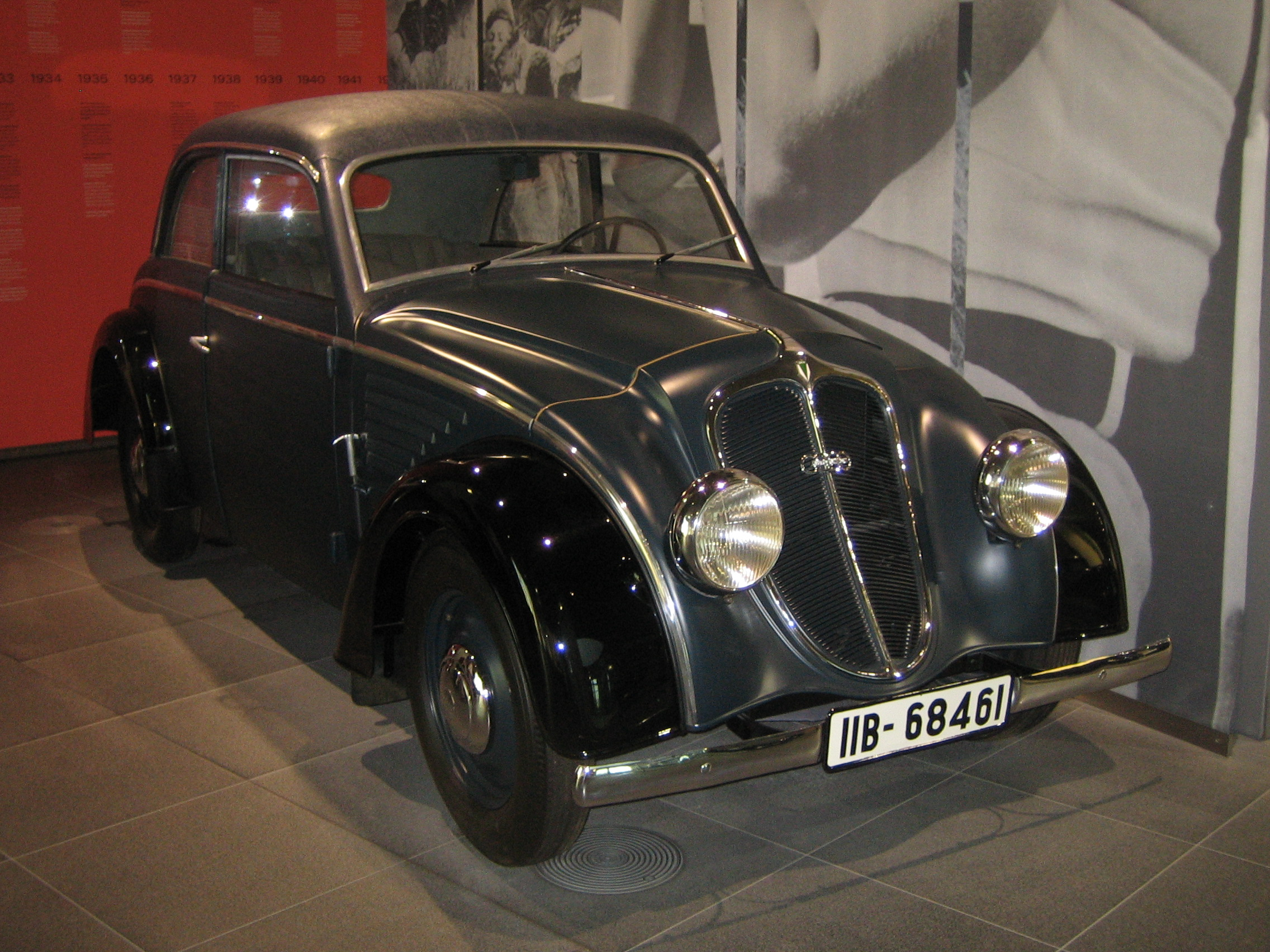 DKW Schwebeklasse im museum mobile in Ingolstadt